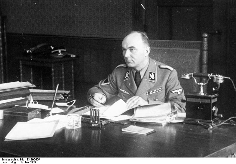 Arthur Greiser Der Chef der Zivilverwaltung beim Militärbefehlshaber in Posen, Brigadeführer Präsident Greiser in seinem Arbeitszimmer in Posen. 11.10.39 "Fr. OKW" [Arthur Greiser am Schreibtisch] Abgebildete Personen: Greiser, Arthur: Senatspräsident von Danzig, Gauleiter Warthegau, Deutschland